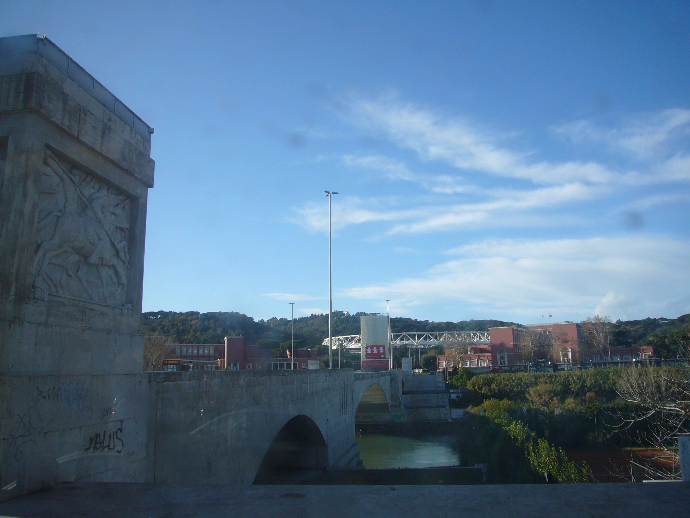 Roma, ponte Duca d'Aosta verso il Foro Italico